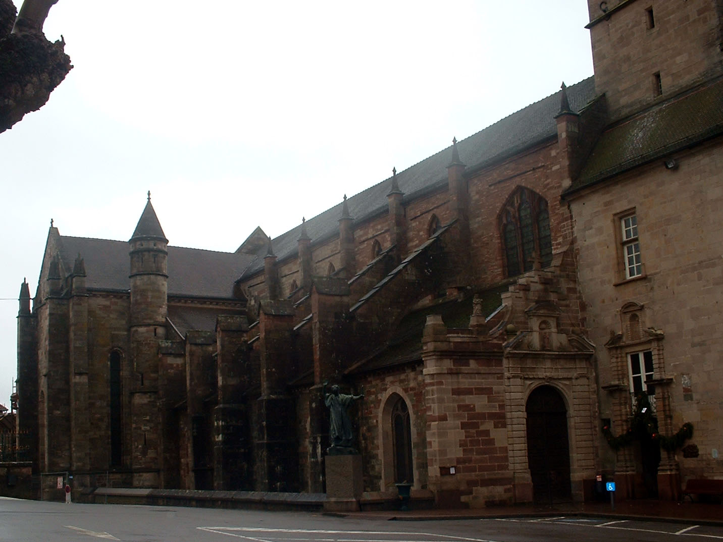 Basilique St-Pierre, Place de la Baille, Luxeuil-les-bains, Haute Saône, Franche Comté, France. Photograph taken on January 11, 2004, 11:00am by Arnaud Bresson.